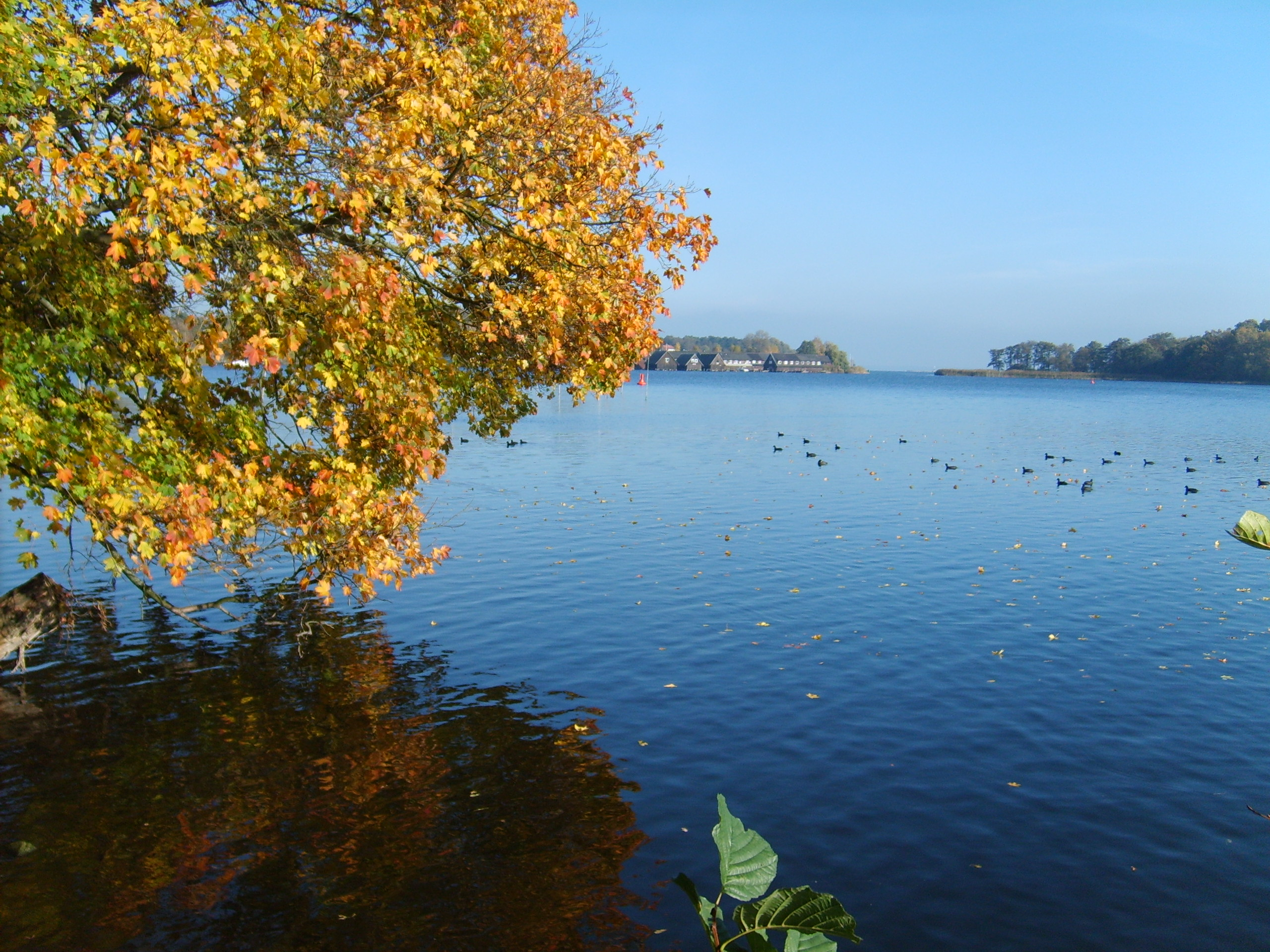 Müritz.